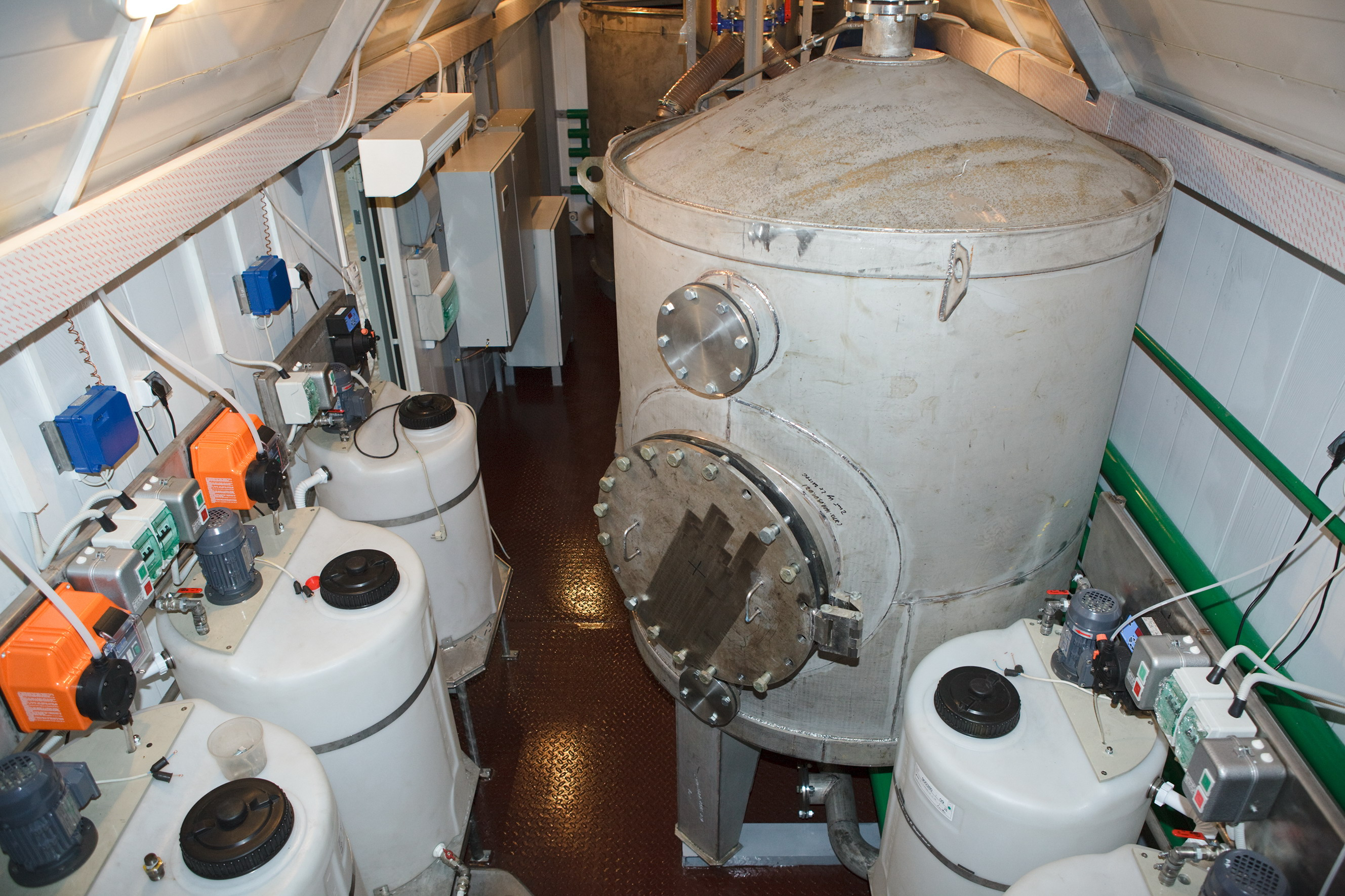 Водопад (станция водоподготовки) производства Экспериментального завода ООО «ТюменНИИгипрогаз». г. Тюмень. 17 июля 2012 года